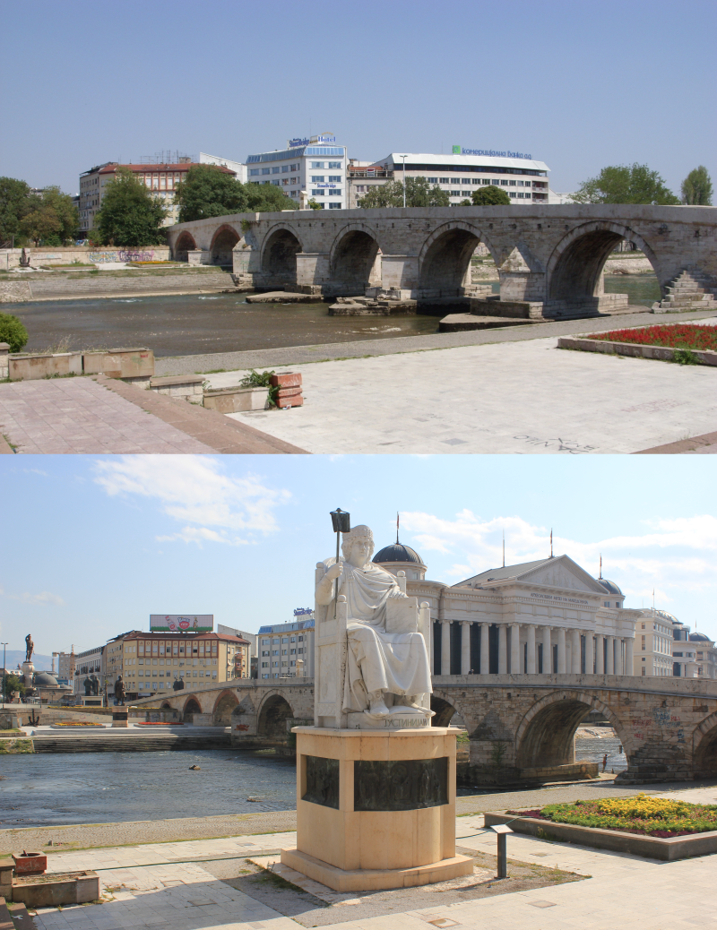 Die Steinbrücke (Kamen Most) über den Vardar in Skopje und ihre städtebauliche Umgebung 2008 (oben) und 2017 (unten).